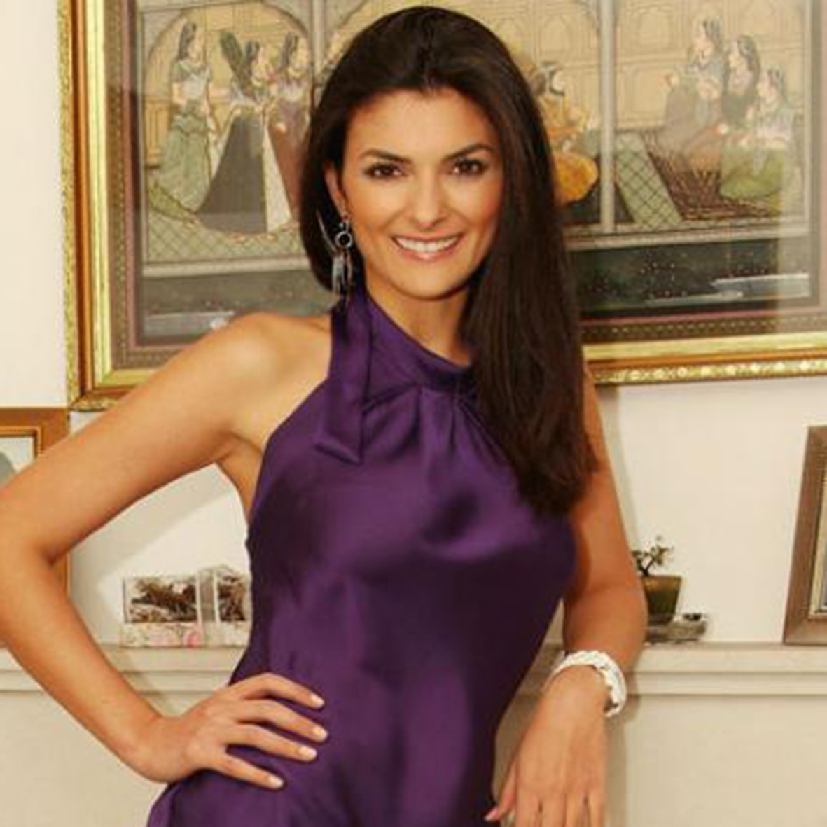 tomada junto a una chimenea